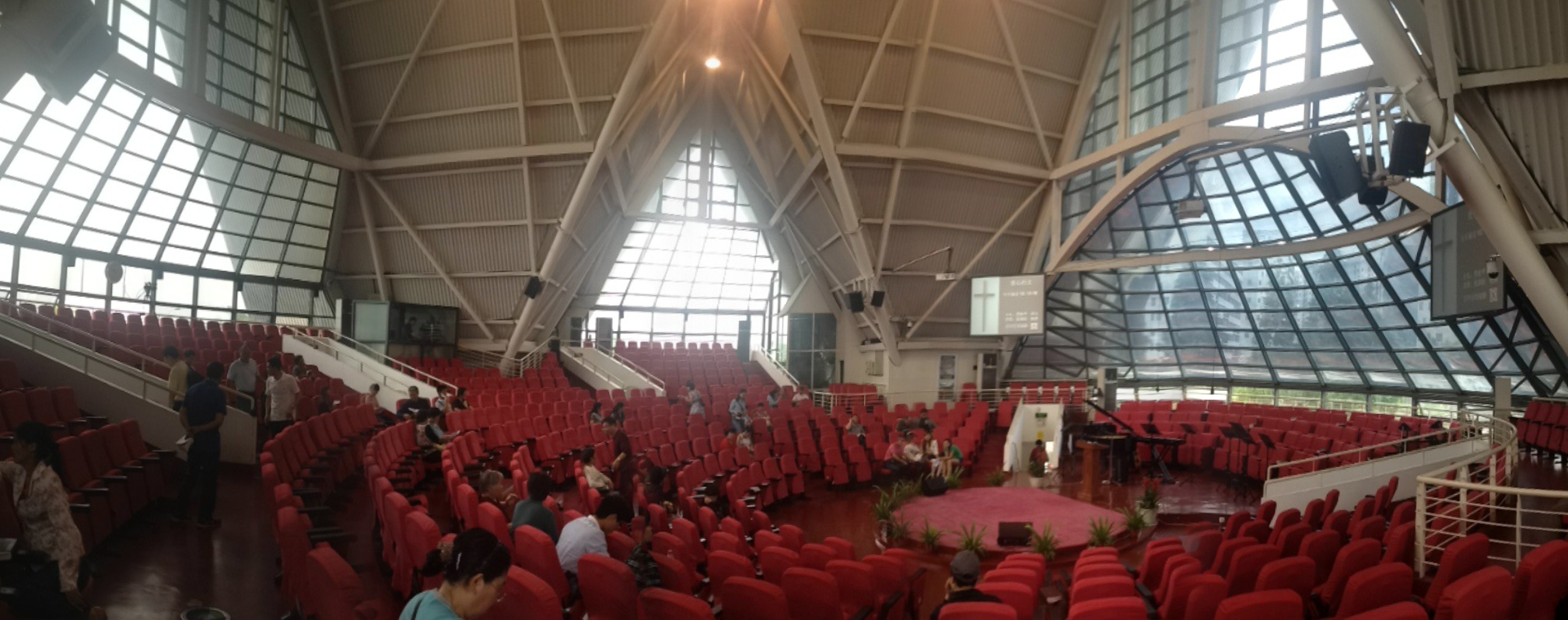 上海张江感恩堂